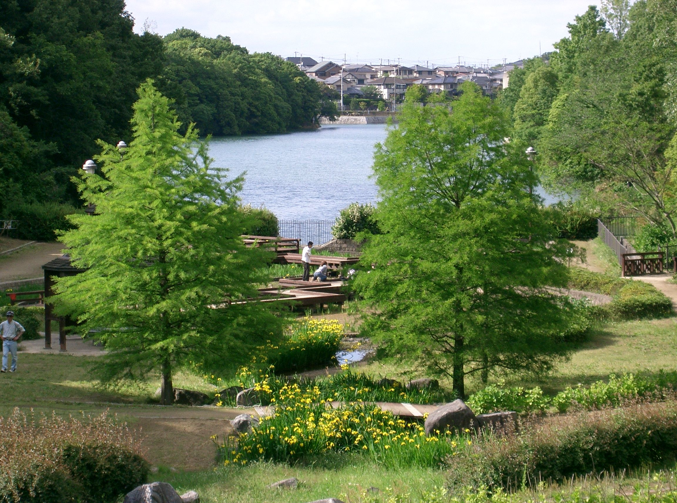 Teragaike Park